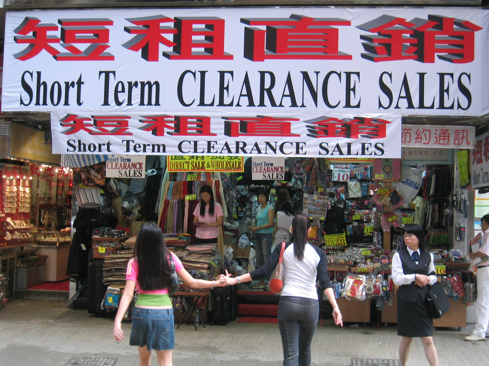 A shop at Causeway Bay, Hong Kong